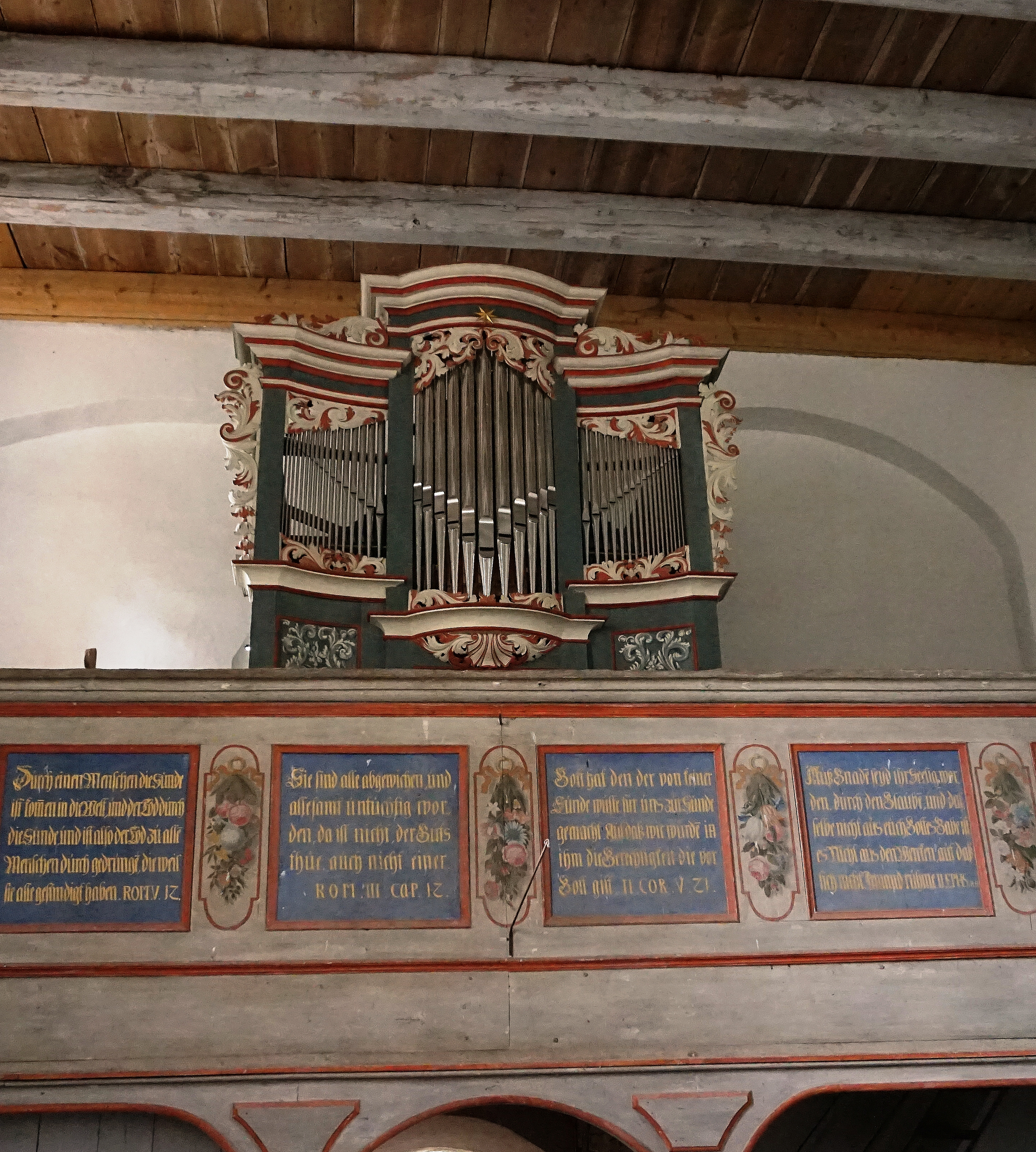 Die Orgel, die sich zuvor in der Kirche in Gramzow befand, wurde 1736 von Joachim Wagner gefertigt